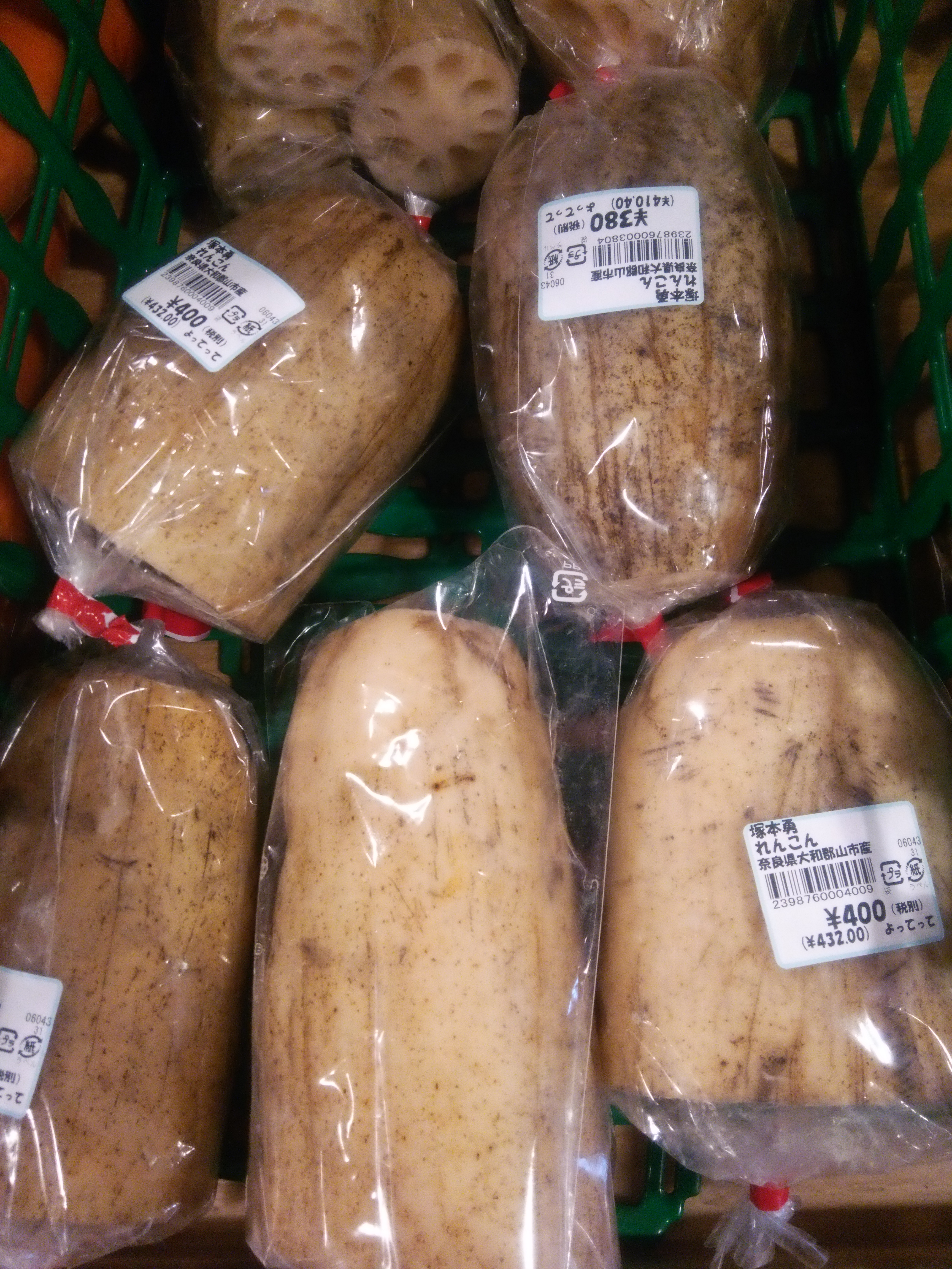 直売所で売られる「筒井れんこん」